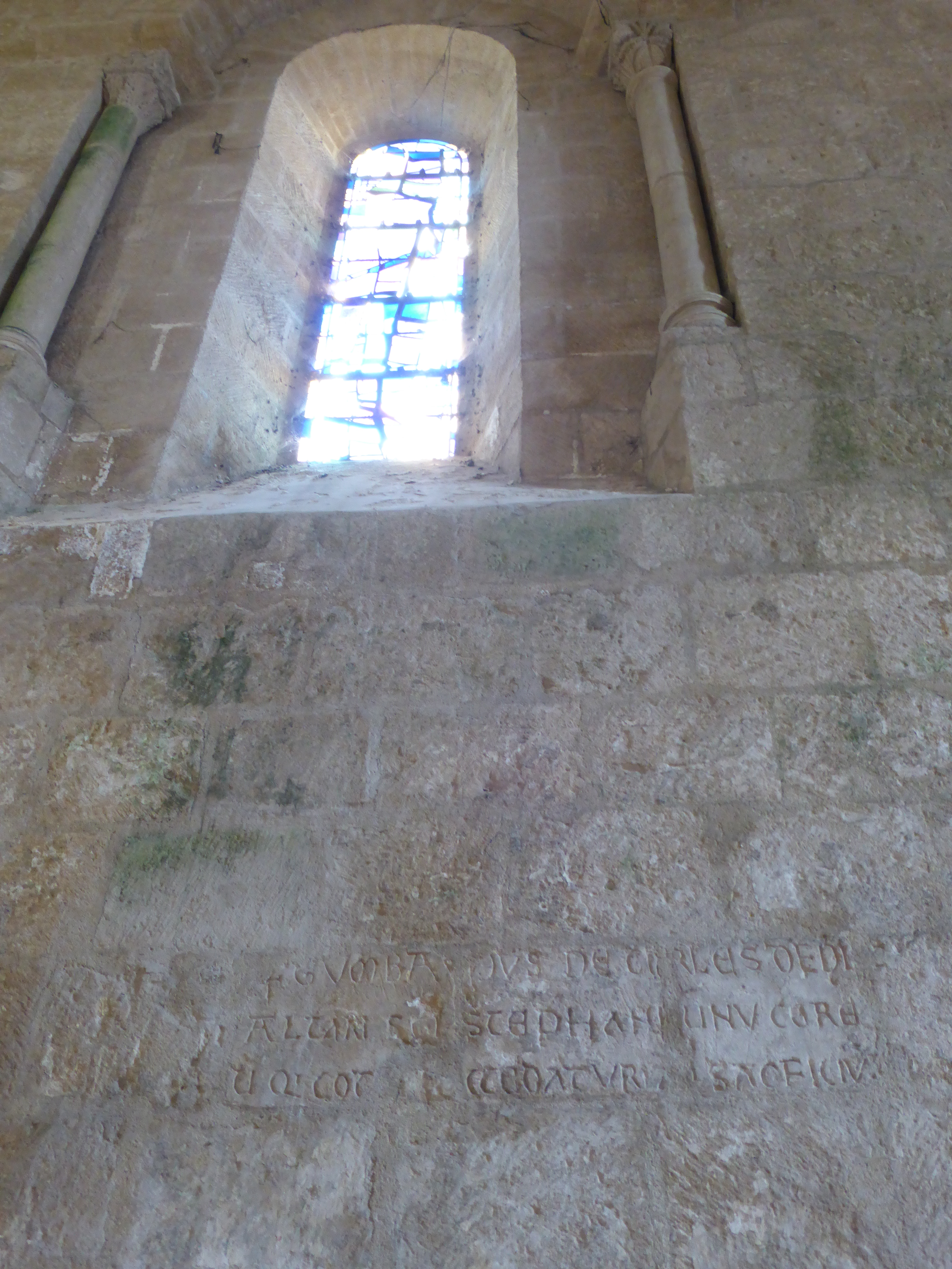 Inscription dans l'Abbatiale Saint-Étienne de Vaux-sur-Mer .